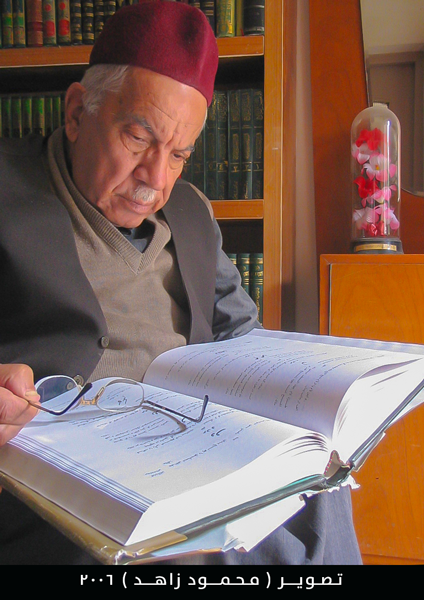 الدكتور حسين علي محفوظ في مكتبته الخاصة في منطقة الكاظمية ببغداد تصوير : محمود زاهد 2006